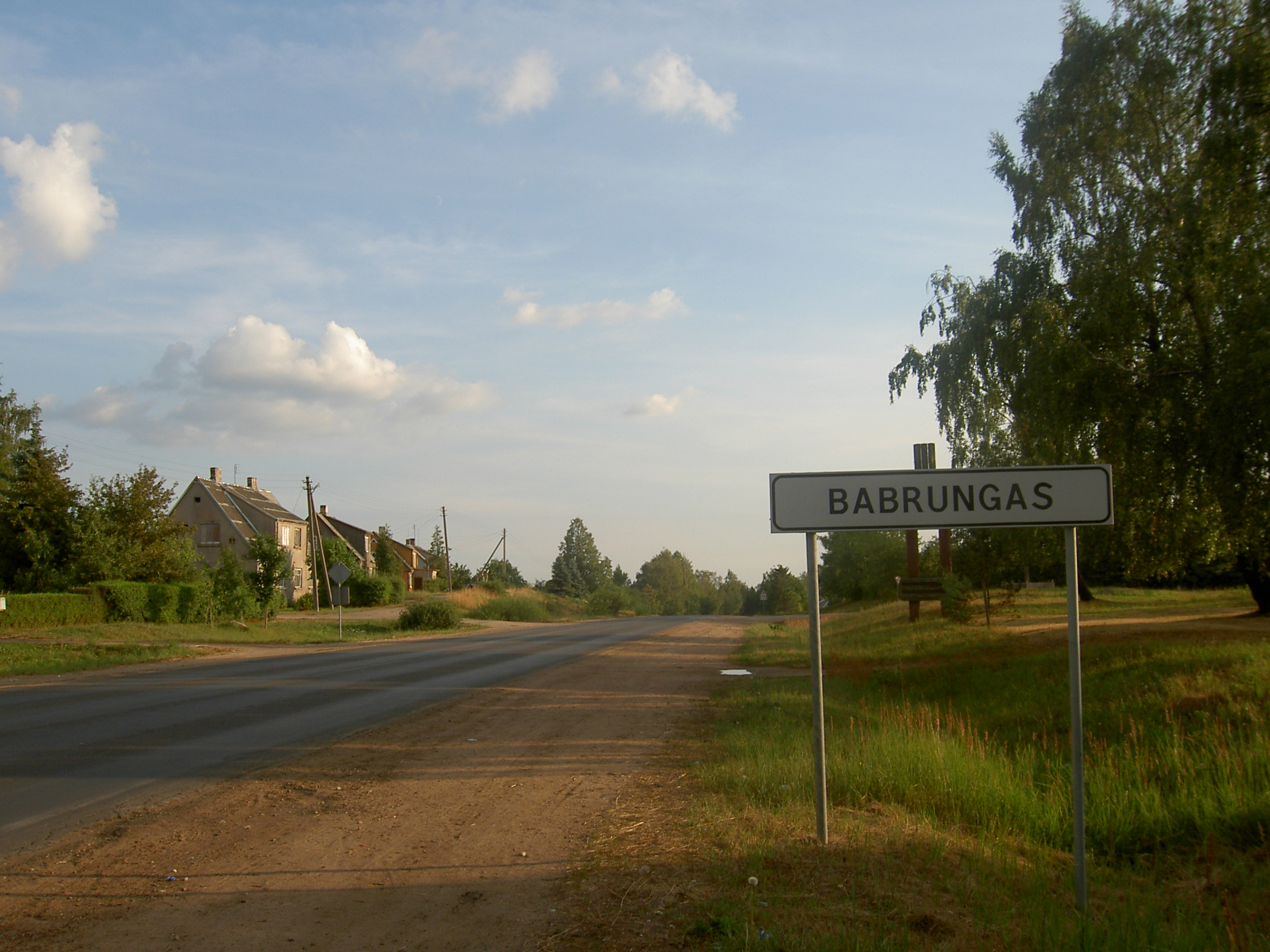 Babrungas